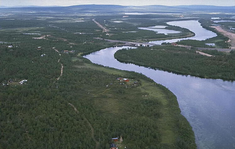 Motiv: Kaitum Nyckelord: Flygbilder, Riksintressen Kategori: Fjällbygd Kaitum